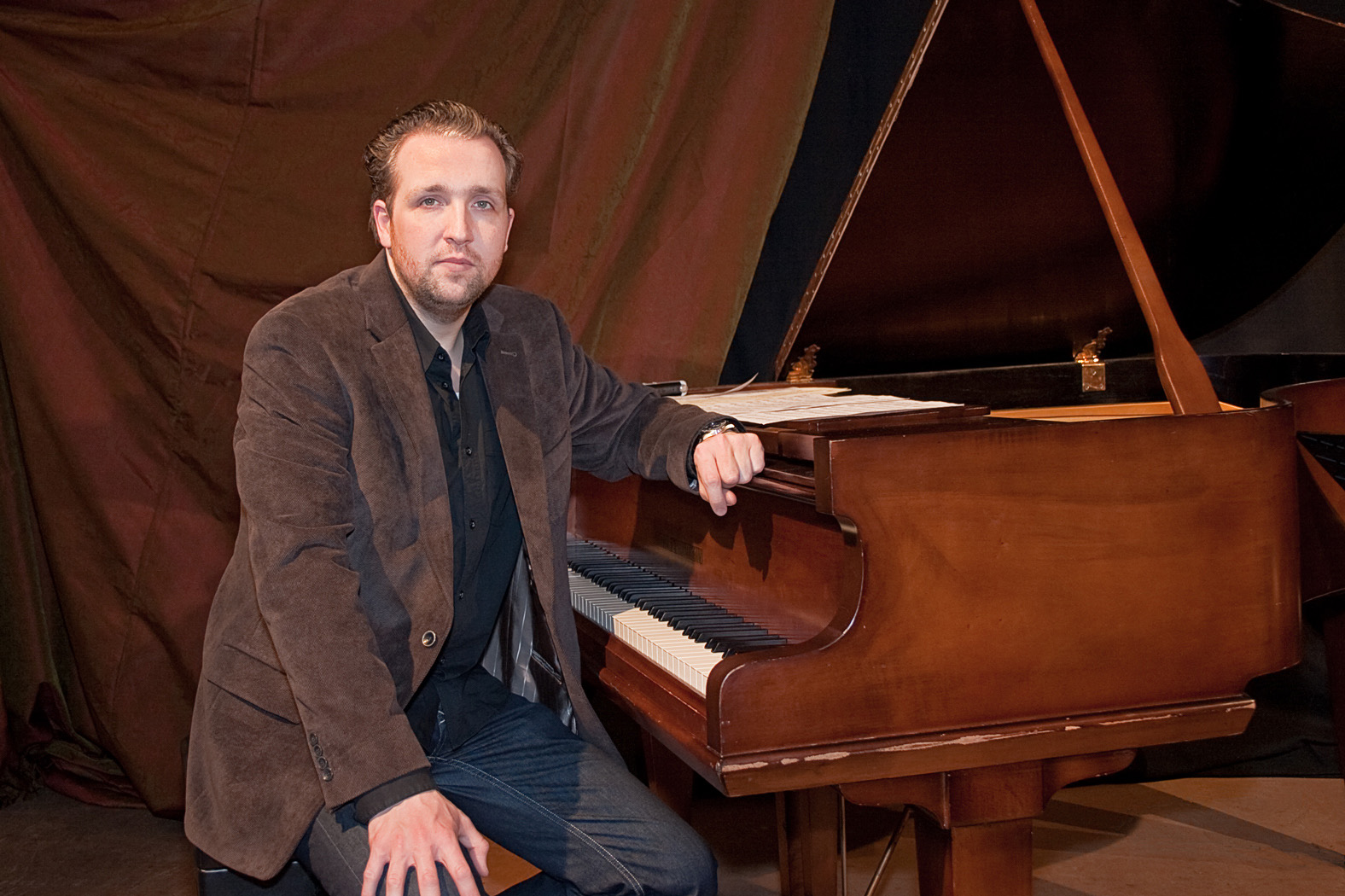 Sebastian Gahler (* 1978) ist ein deutscher Jazzpianist und -komponist.